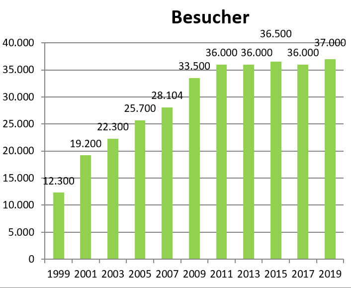 Besucher Statistik